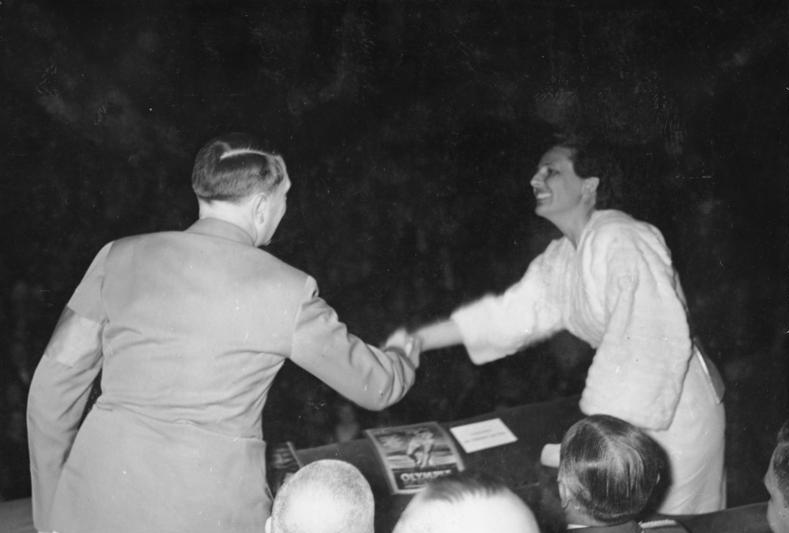 Der Führer beglückwünscht Leni Riefenstahl zum grossen Erfolg.